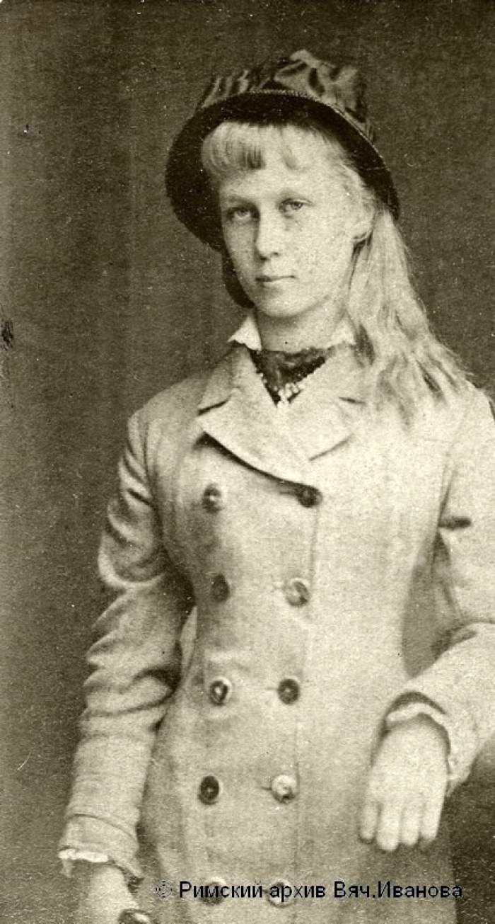 Л. Д. Зиновьева-Аннибал. Конец 1870-х - начало 1880-х